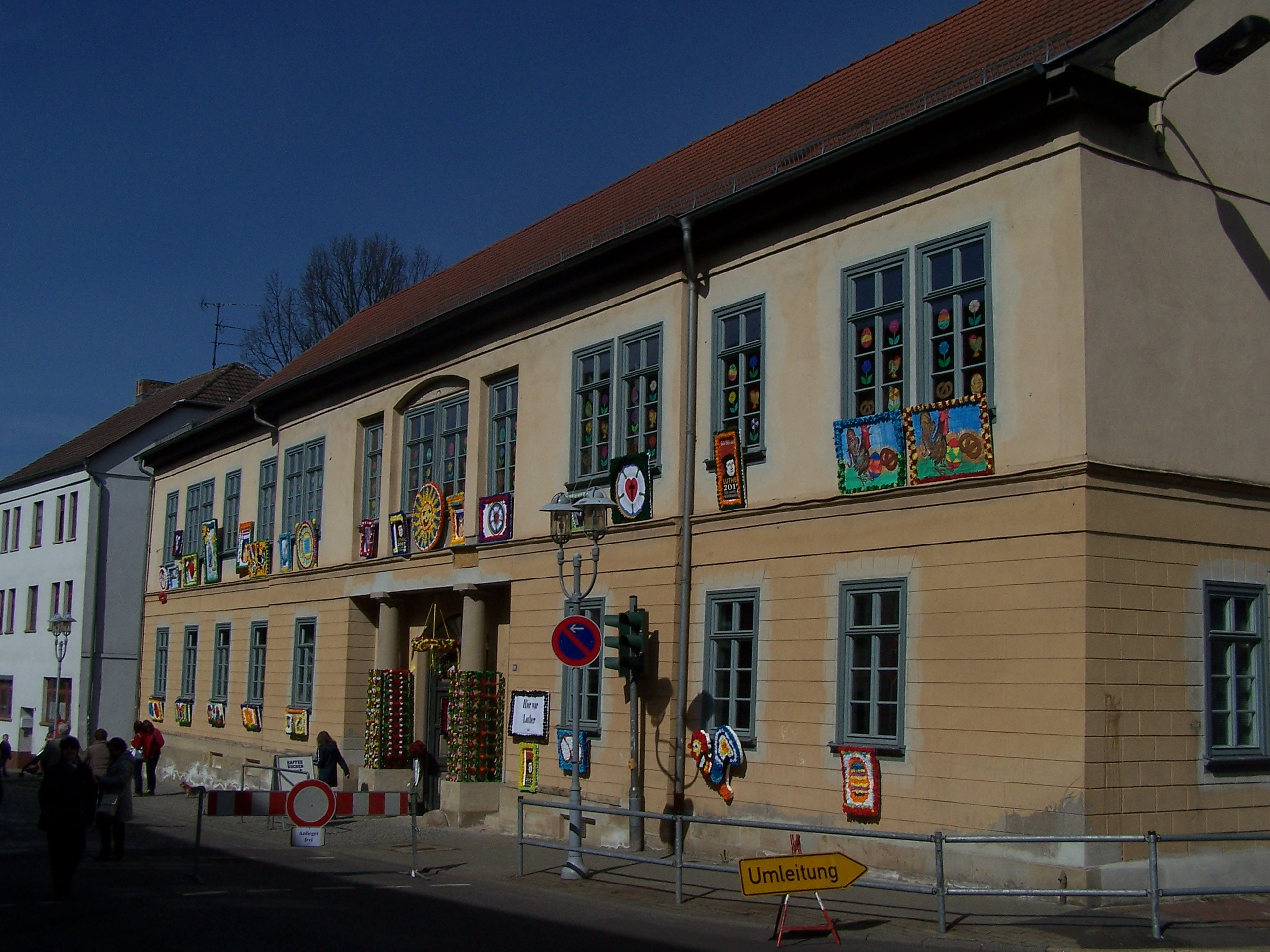 Impressionen vom Eisenacher Volksfest Sommergewinn am 25. März 2017. In der Georgenstraße.